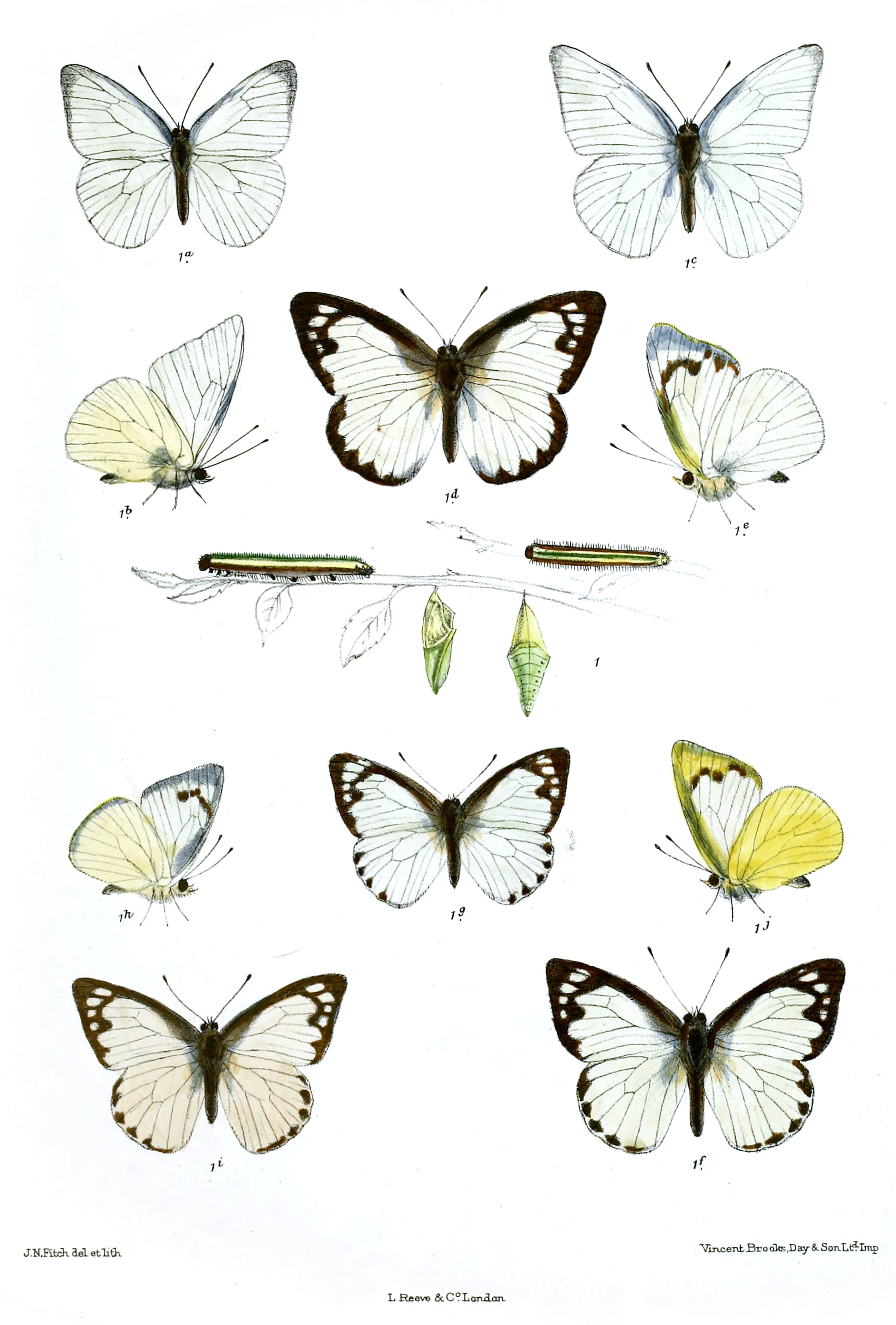 Catophaga swinhoei=Appias albina swinhoei 1a b c male 1d e f g h i j female